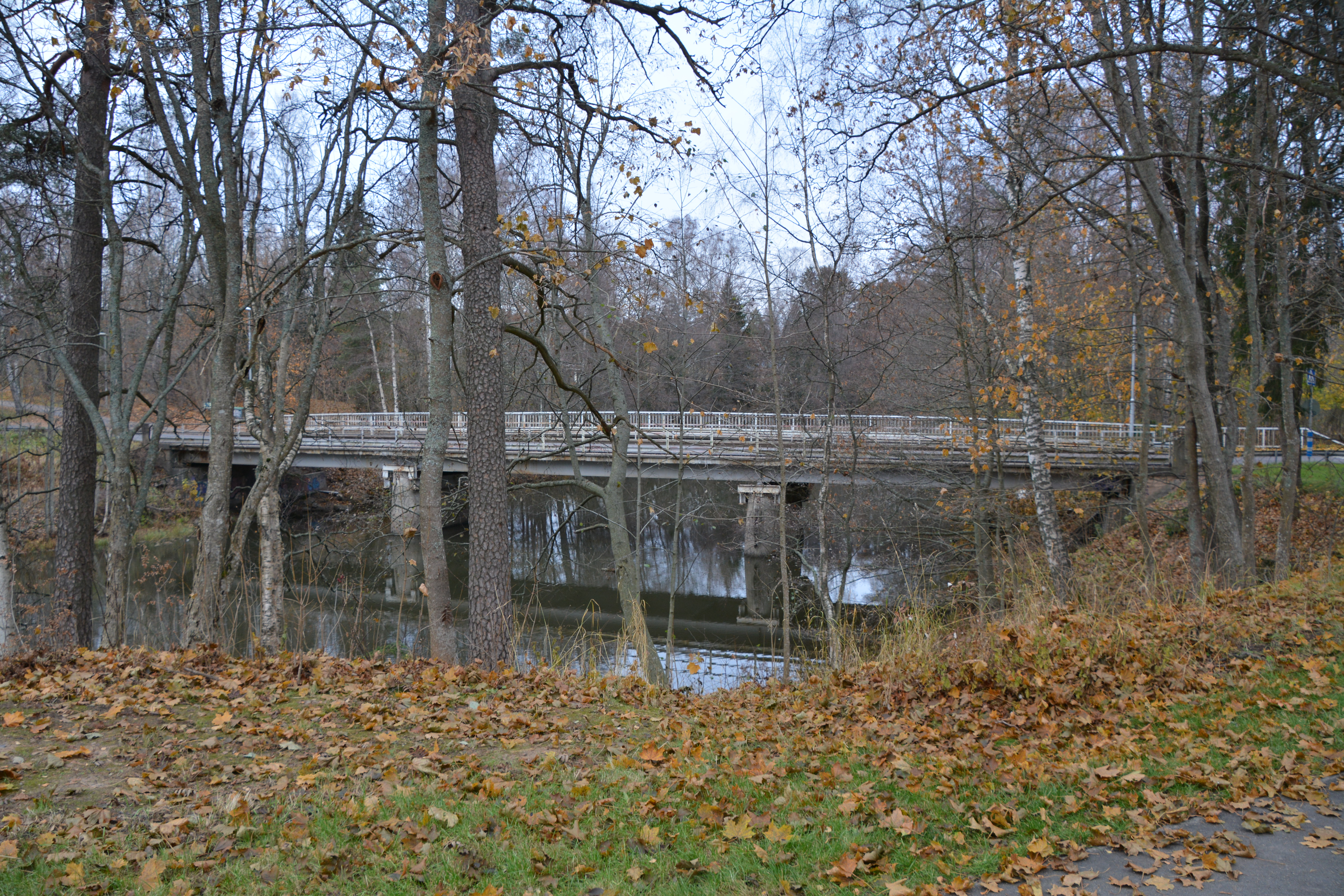 Landsbron över Svartån, Nyland, Finland, fotograferad från söder